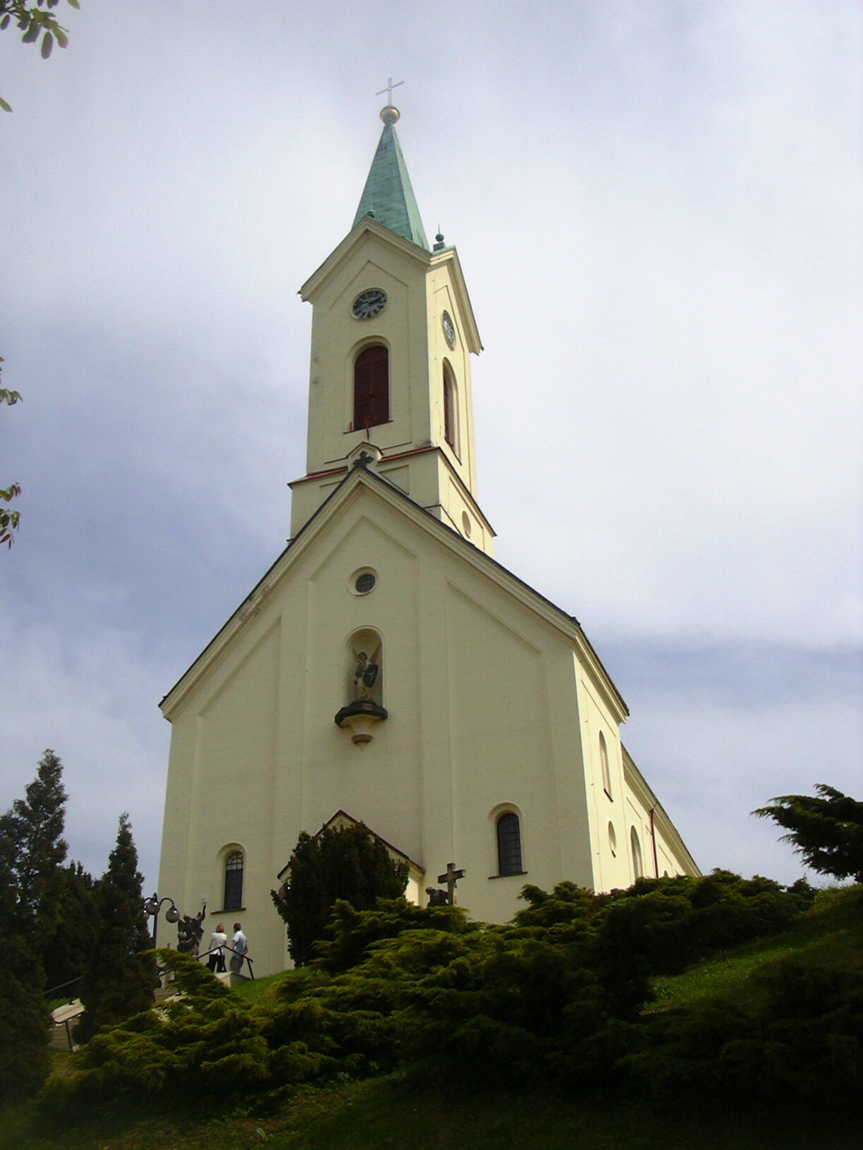 Kostel svatého Michala, Švábenice (Vyškov District - Czech Republic)